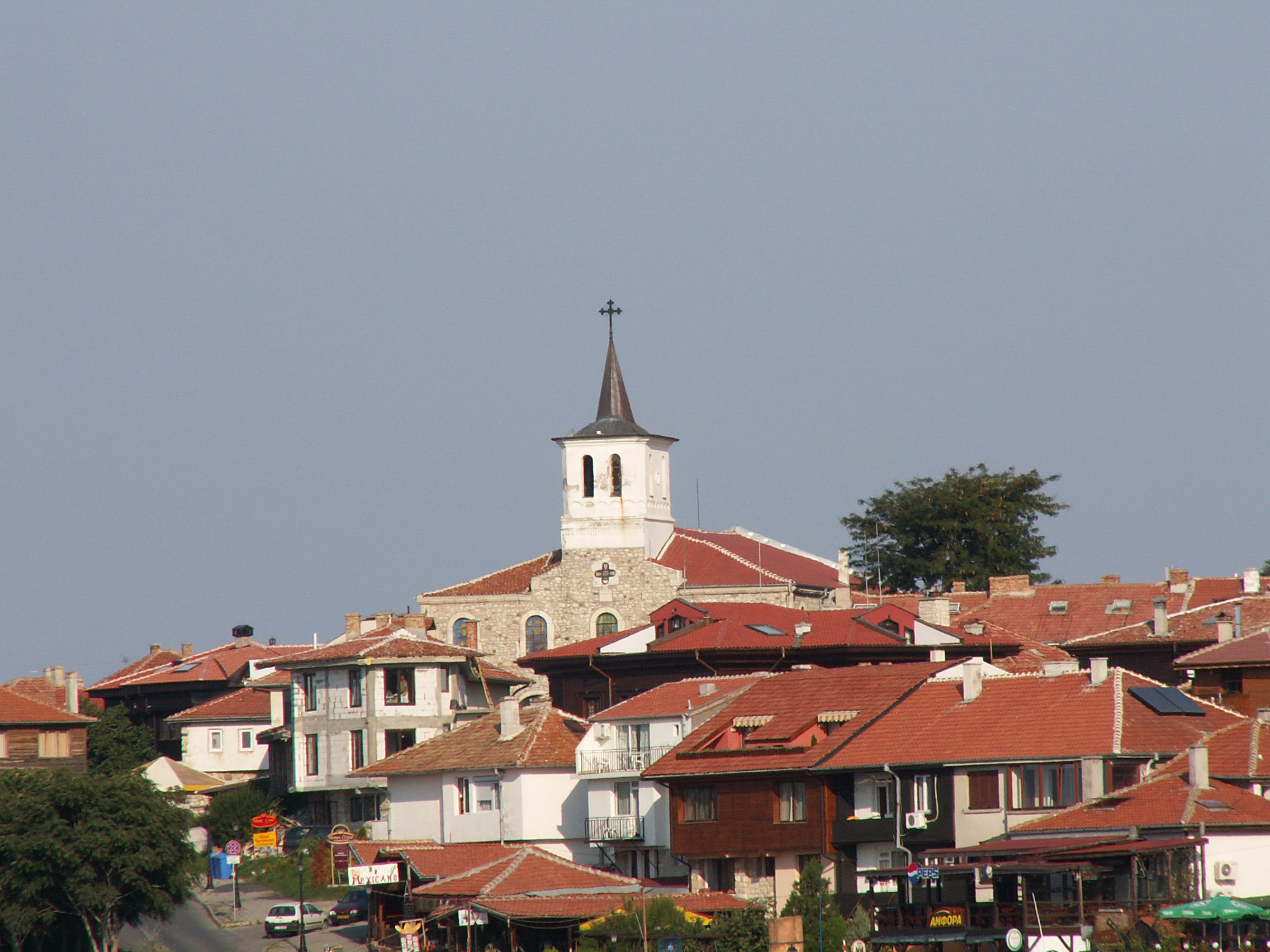 Panorama of Nesebar